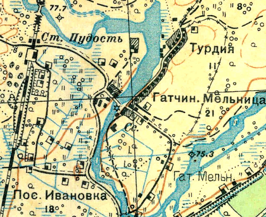 Топографическая карта Ленинградской области, квадрат О-36-13-А-а (Большая Пудость), деревня Мыза-Ивановка